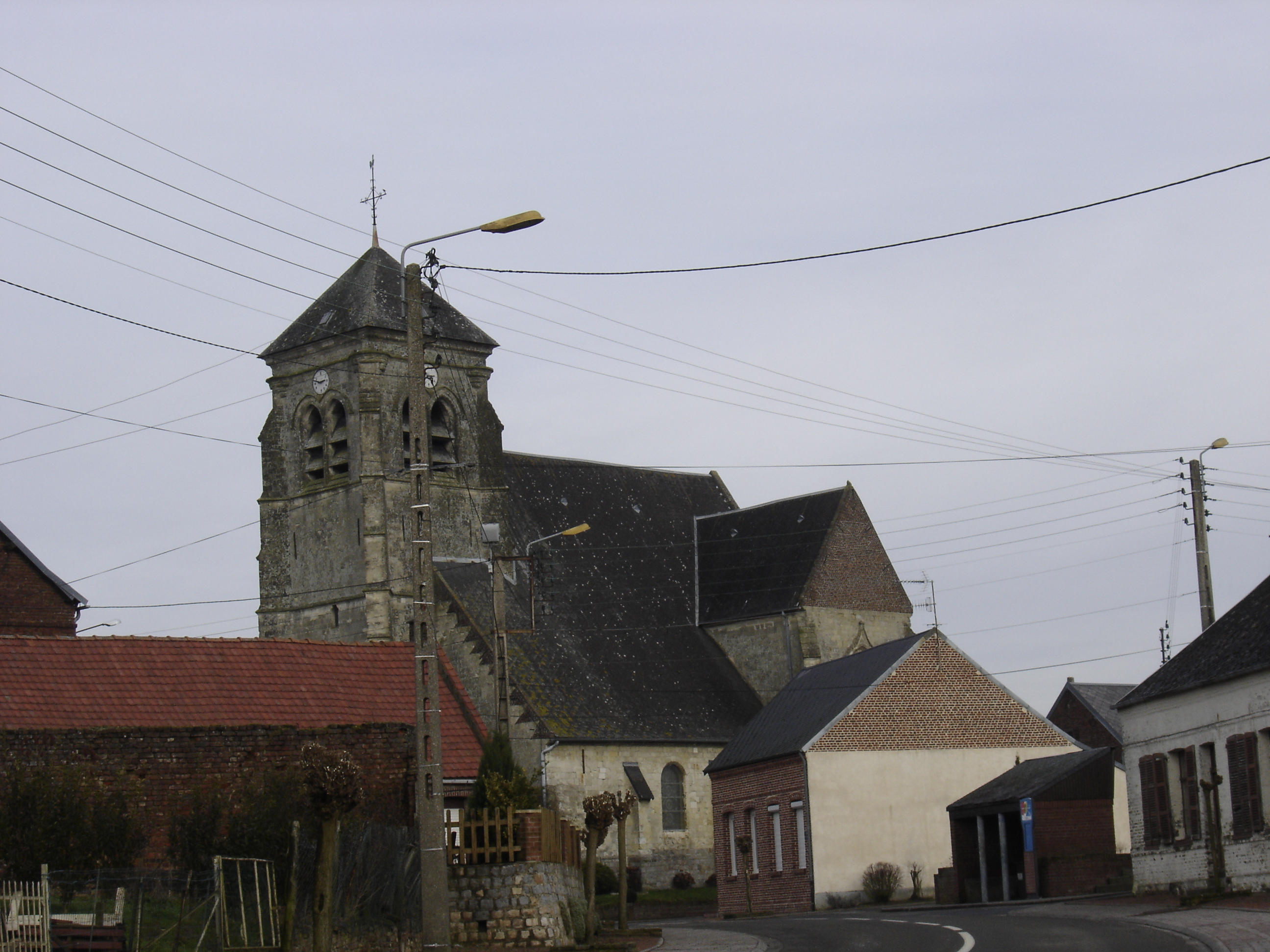 Église d'Élincourt